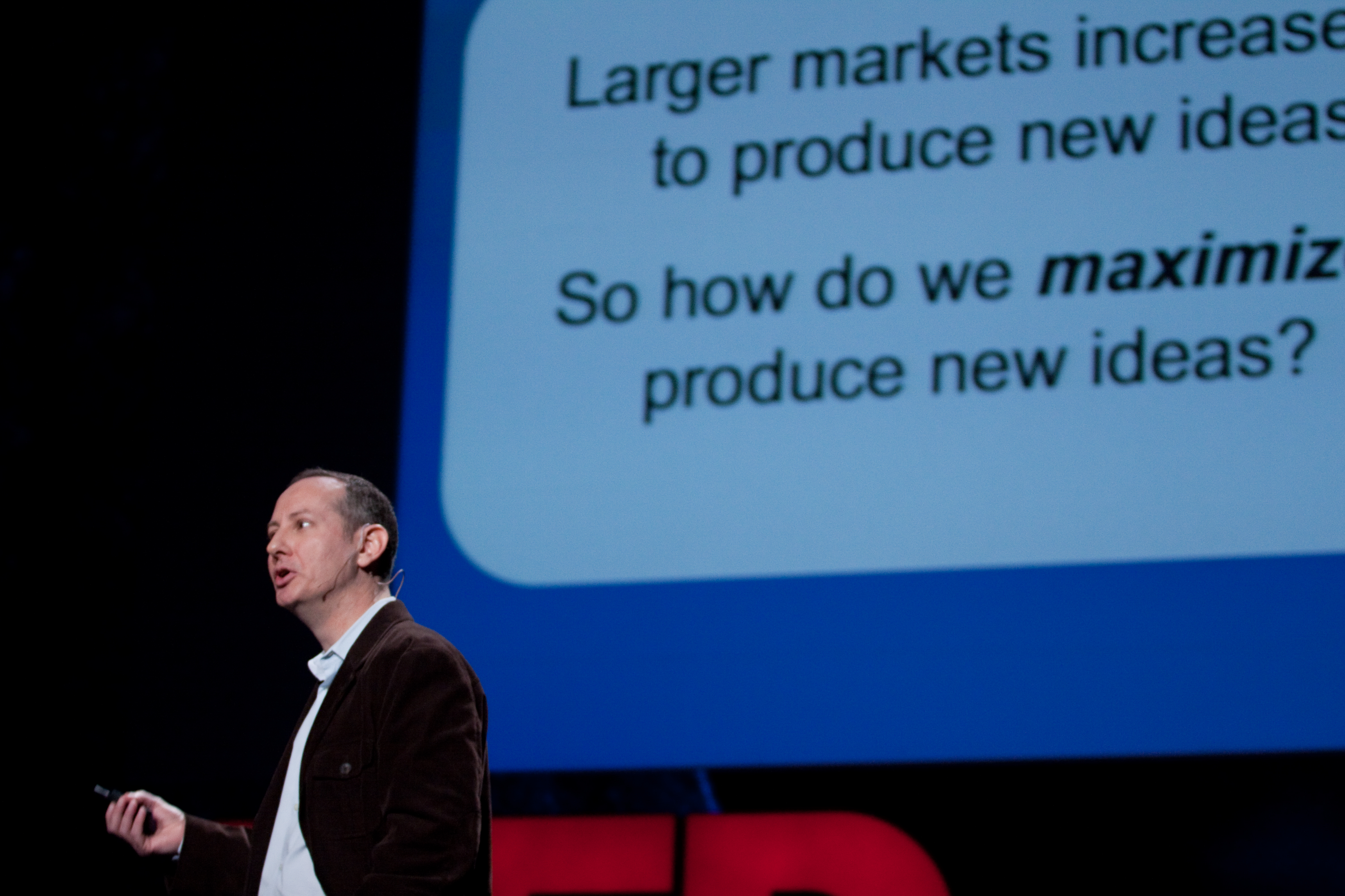 Alex Tabarrok speaking at TED